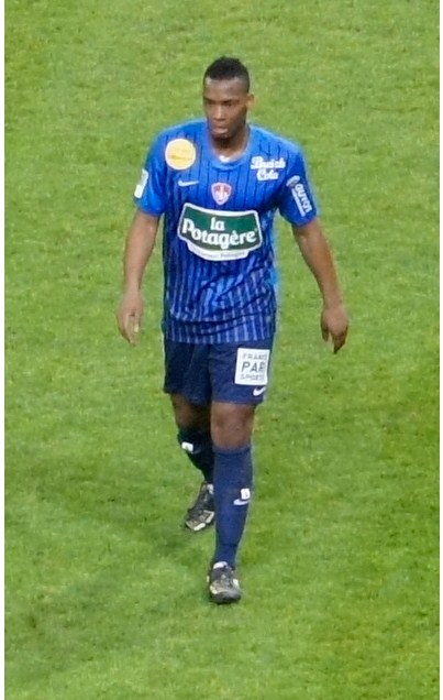 Johan Martial jouant au stade Delaune, 2012.